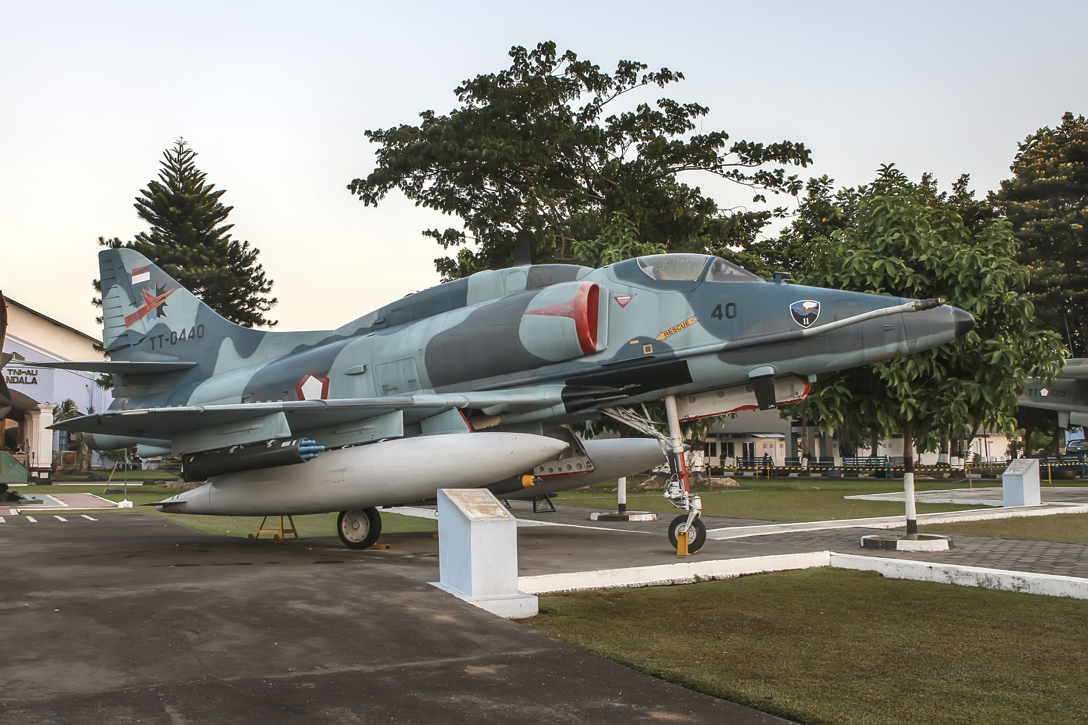 Pesawat A-4 Skyhawk TNI AU